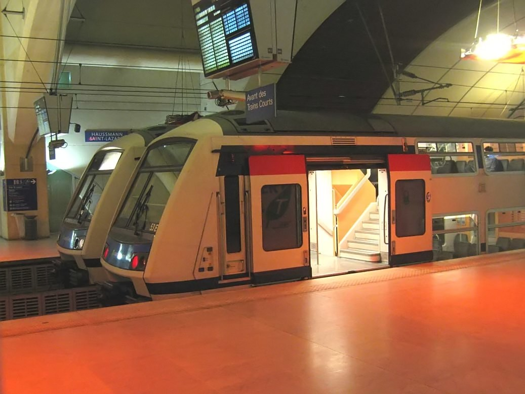 RER Paris ligne E rame Z22500 a la station Haussman Saint Lazare Lieu : Paris, France Date : Juin 2006 Auteur : Pline photo personnelle